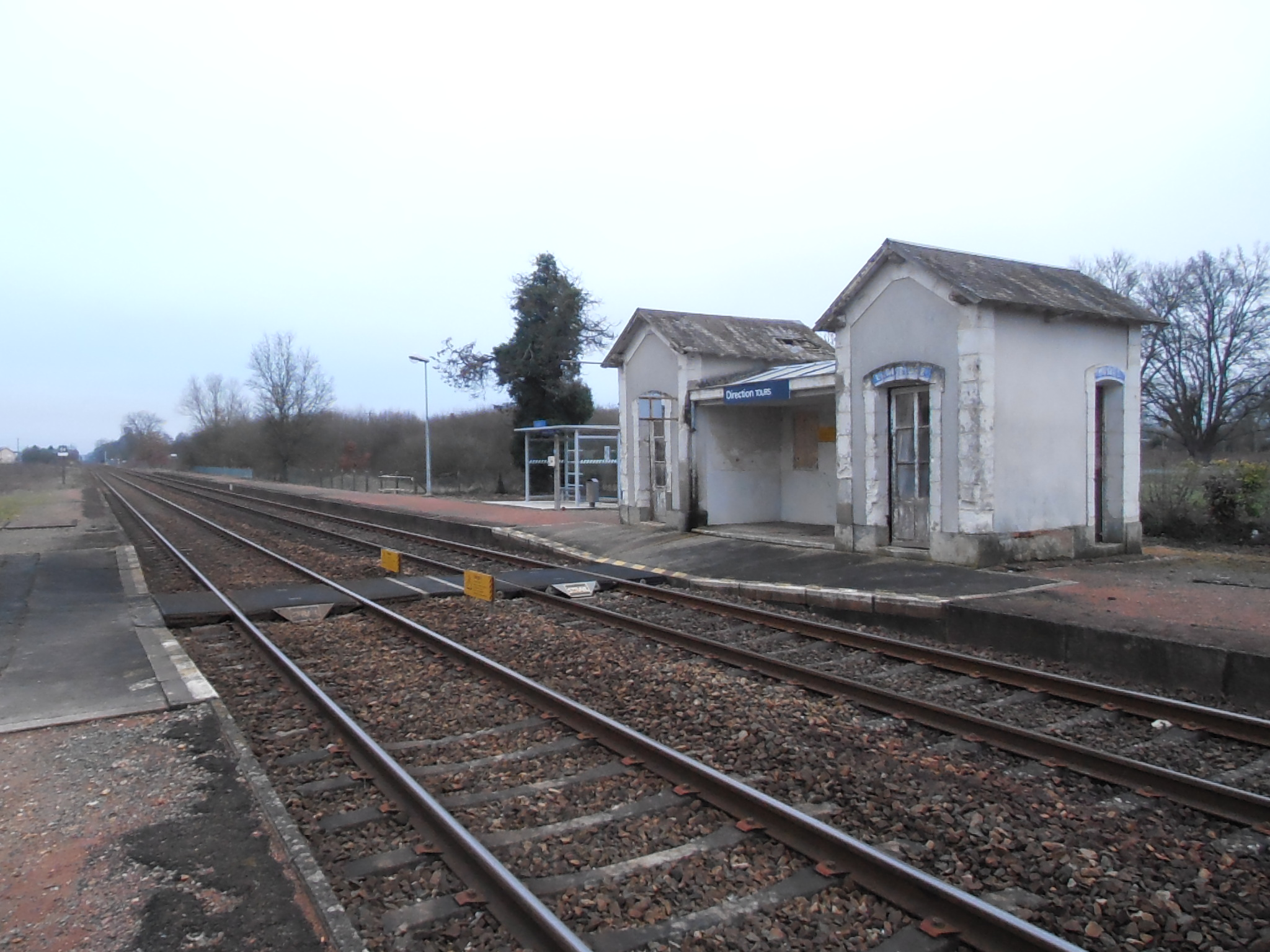 L'aubette de l'autre côté de la gare